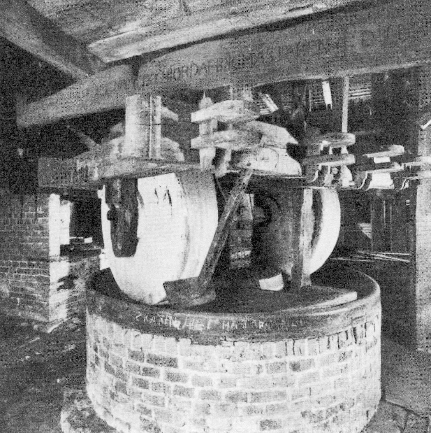 Interiören av Waldemarsuddens oljekvarn